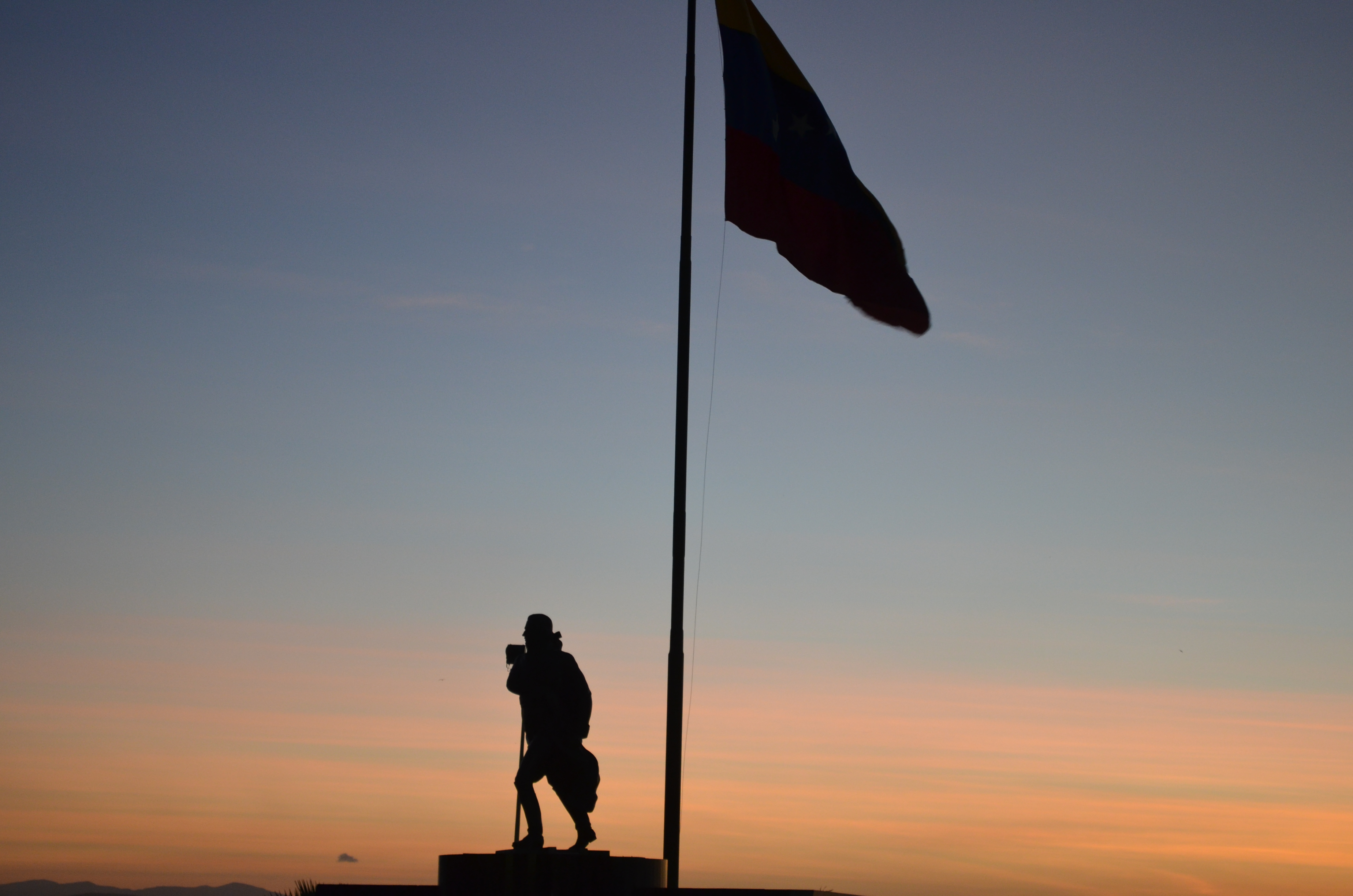 monumento a la bandera y al gestor de la independencia venezolana Francisco de Miranda . La vela de coro Edo Falcon